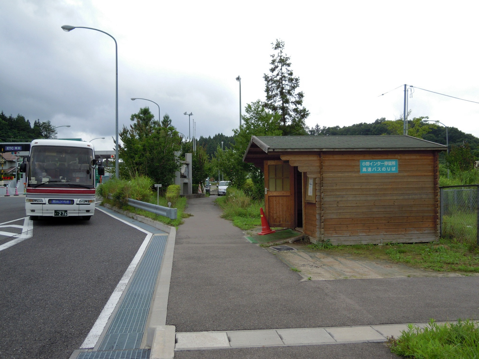 磐越自動車道小野インターチェンジ一般道側に設置されている小野バスストップ